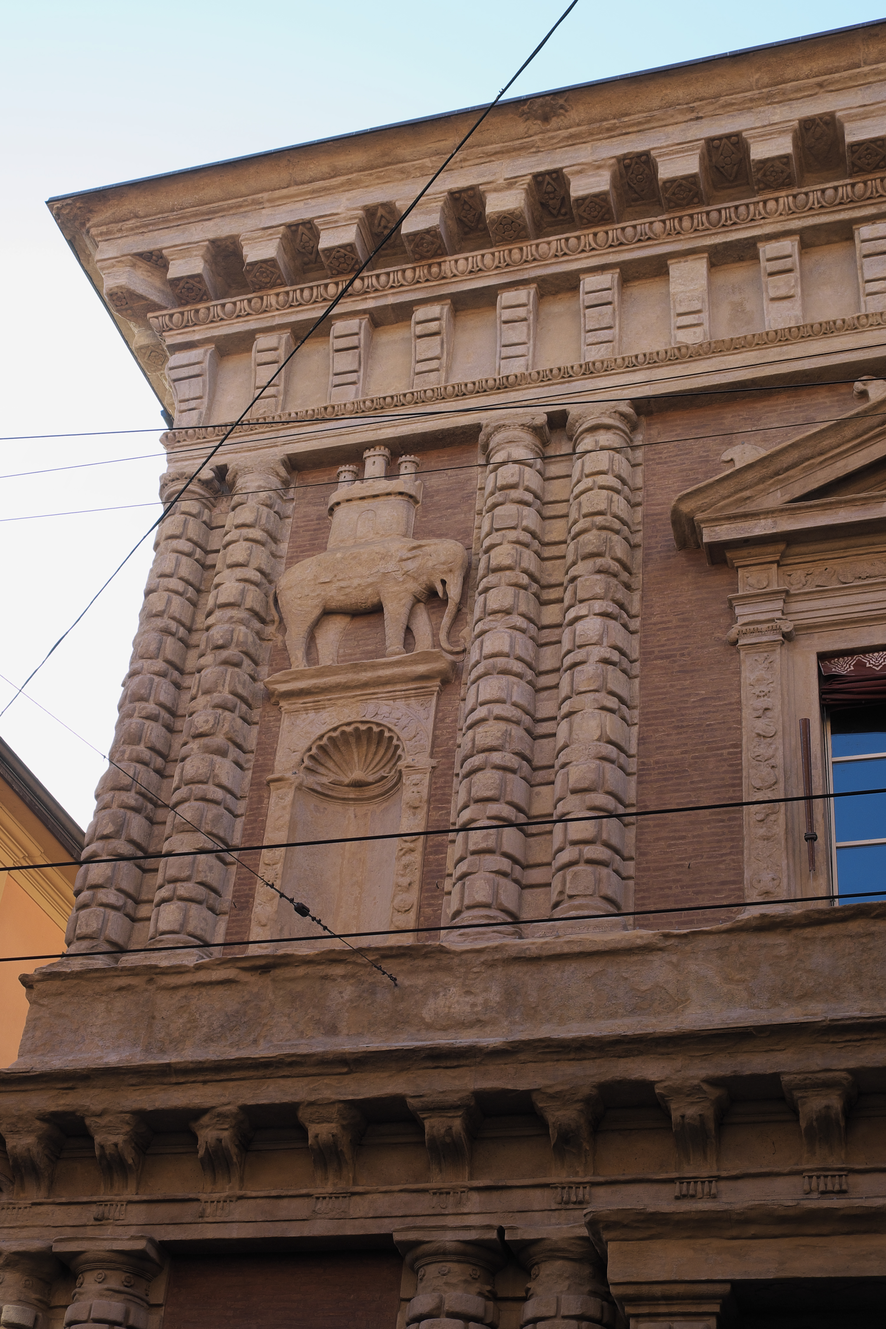 Palazzo Fantuzzi in der Via San Vitale n° 23 in Bologna (Emilia-Romagna/Italien), Relief eines Elefanten